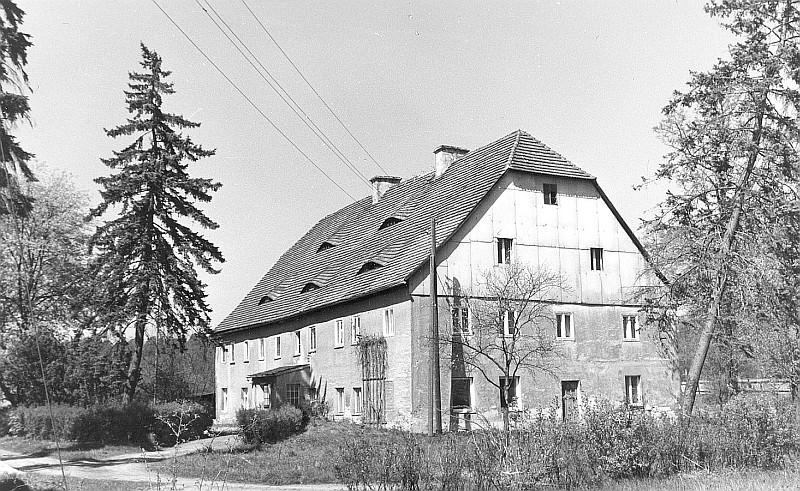 Original image description from the Deutsche Fotothek Rietschen-Hammerstadt. Herrenhaus